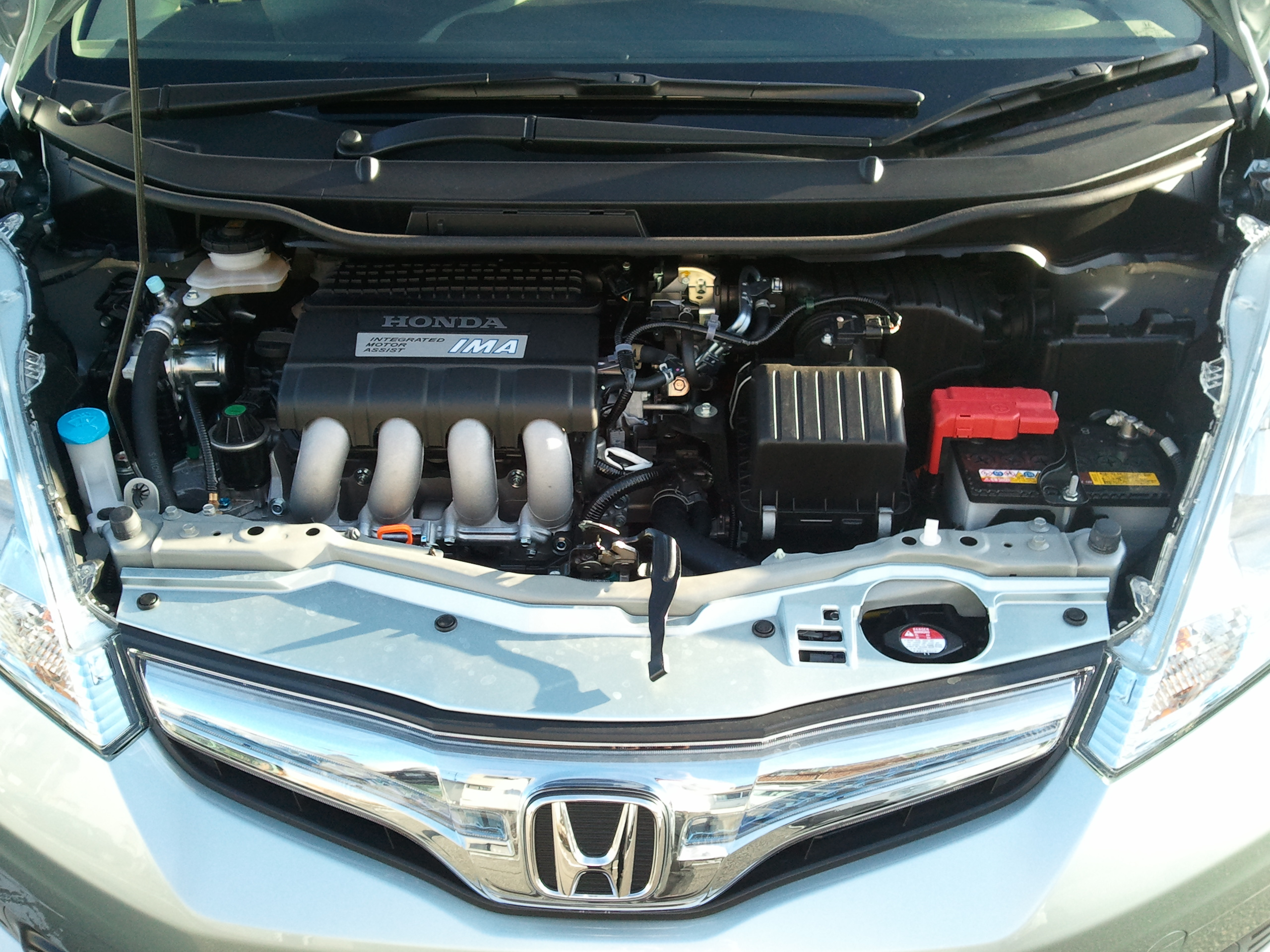 HONDA Fit HYBRID RS 本田技研工業株式会社 FIT HYBRID RS(DAA-GP4)LEA-MF6 エンジン